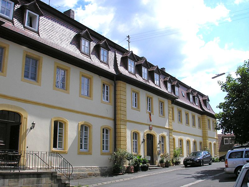 Schloss Maroldsweisach (Landkreis Haßberge, Unterfranken) / Maroldsweisach Castle, Franconia, Germany. Gesamtansicht / Total view. Eigene Aufnahme, Juni 2006 / Own photo, June 2006